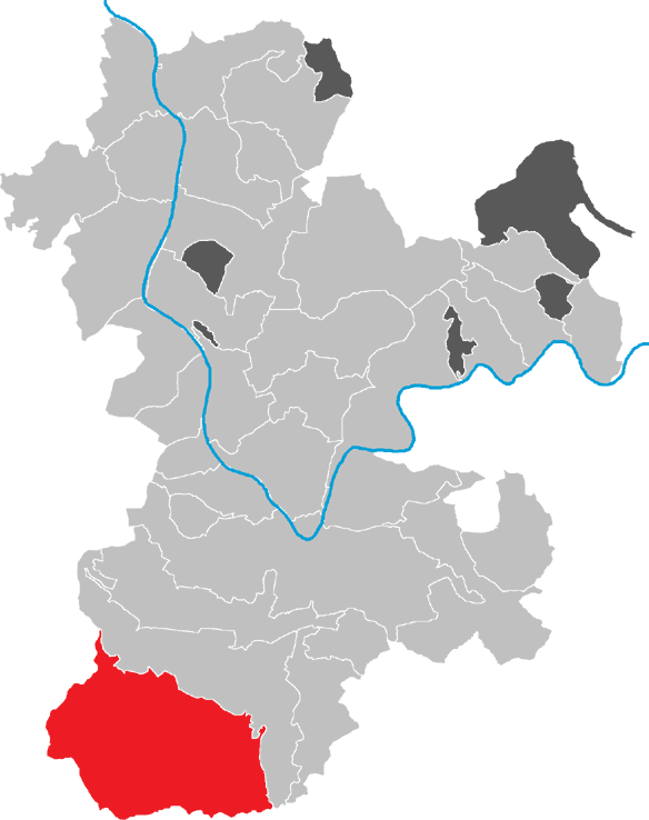 Karte von Kirchzell im Kreis Miltenberg, Bayern, Deutschland.